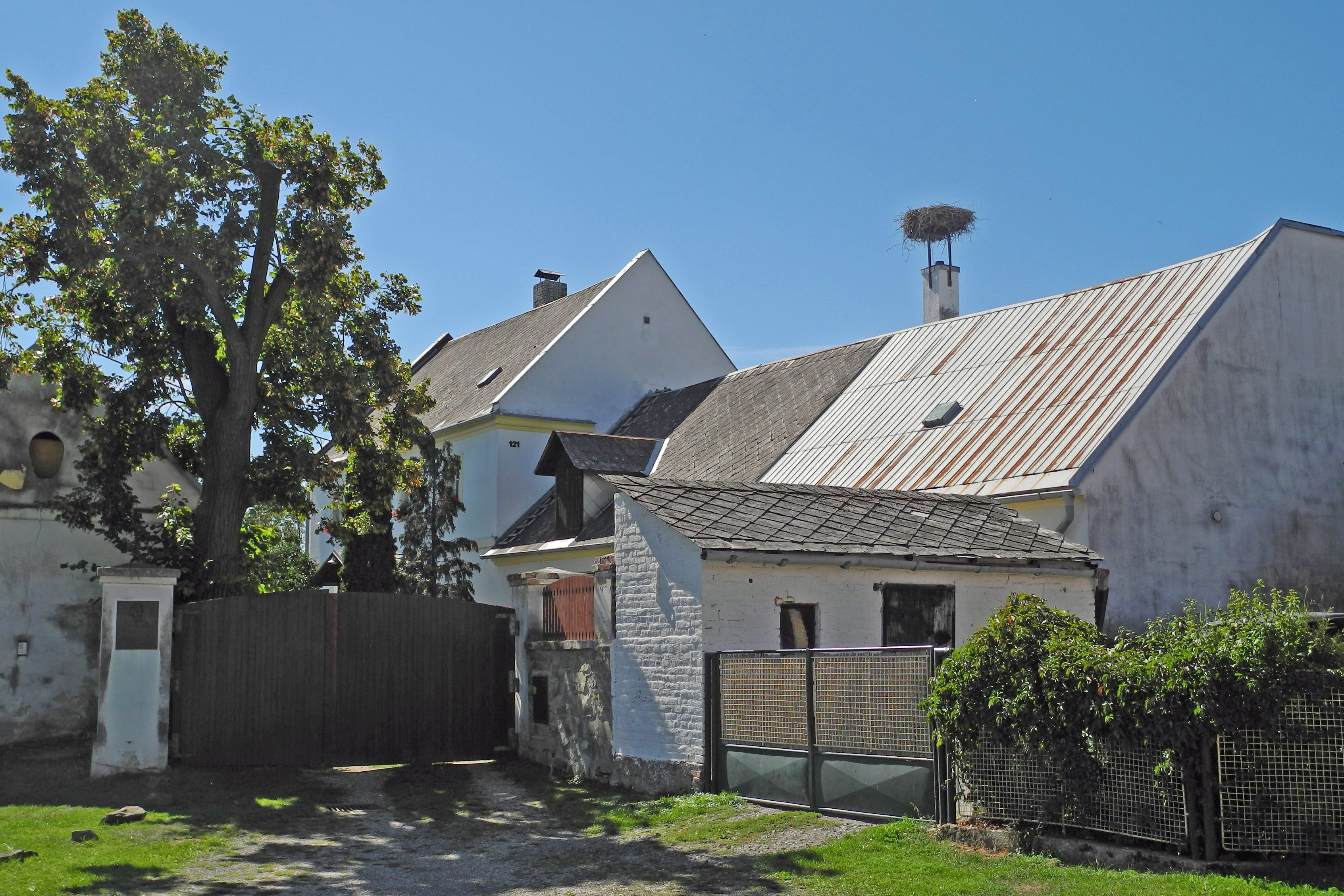 Geburtshaus von Hans Kudlich (1823–1917) – Bauernbefreier, in Lobenstein (Úvalno)